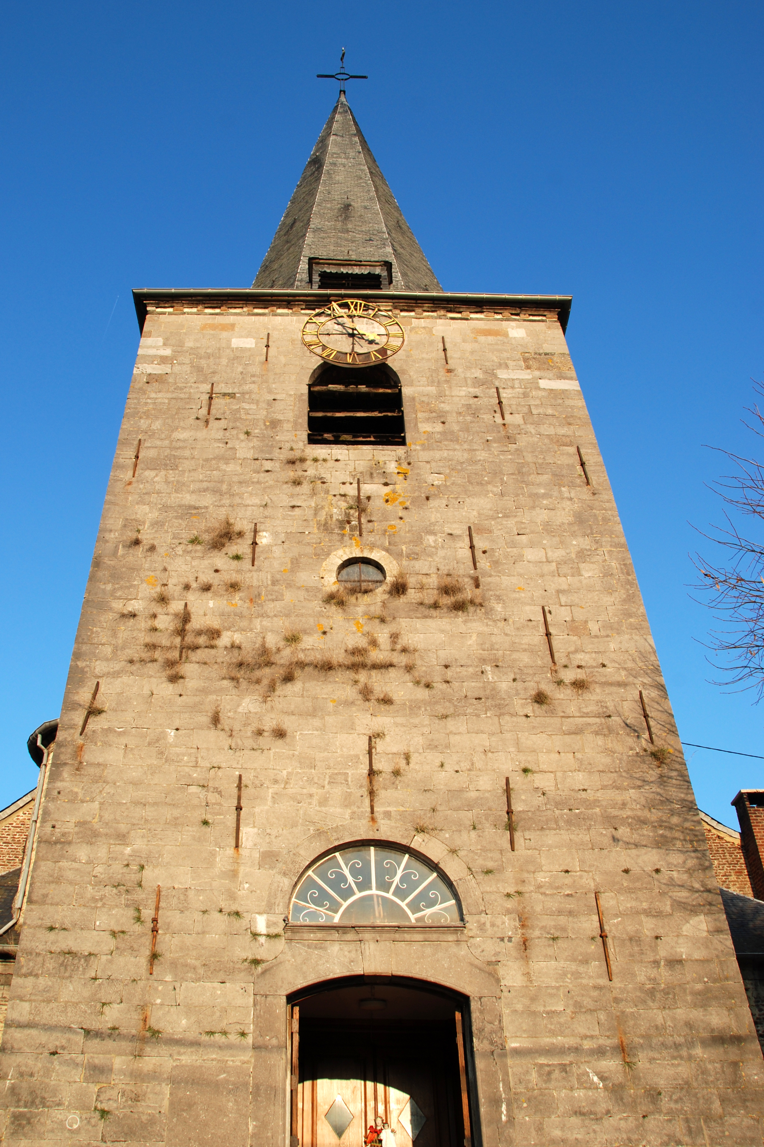 Belgique - Wallonie - Brabant wallon - Église de Court-Saint-Étienne